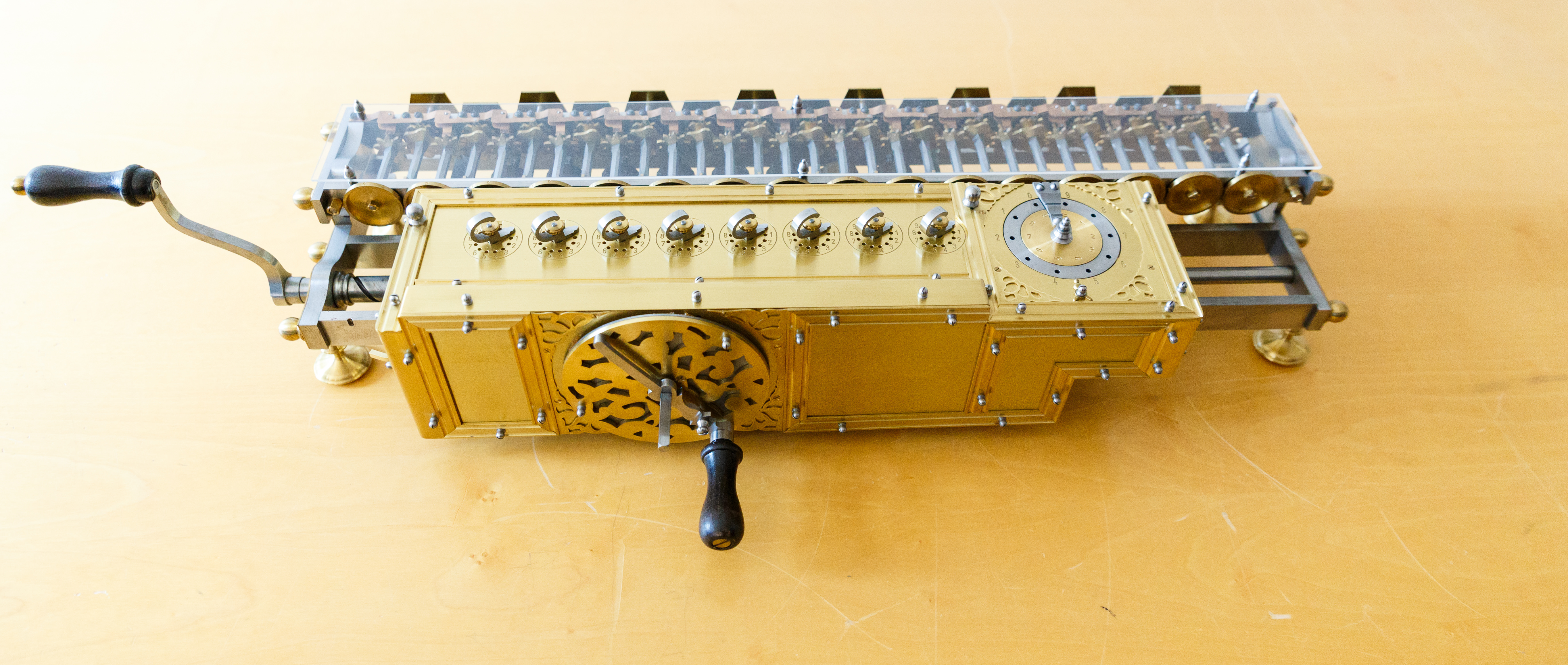 Gottfried Wilhelm Leibniz - Rechenmaschine